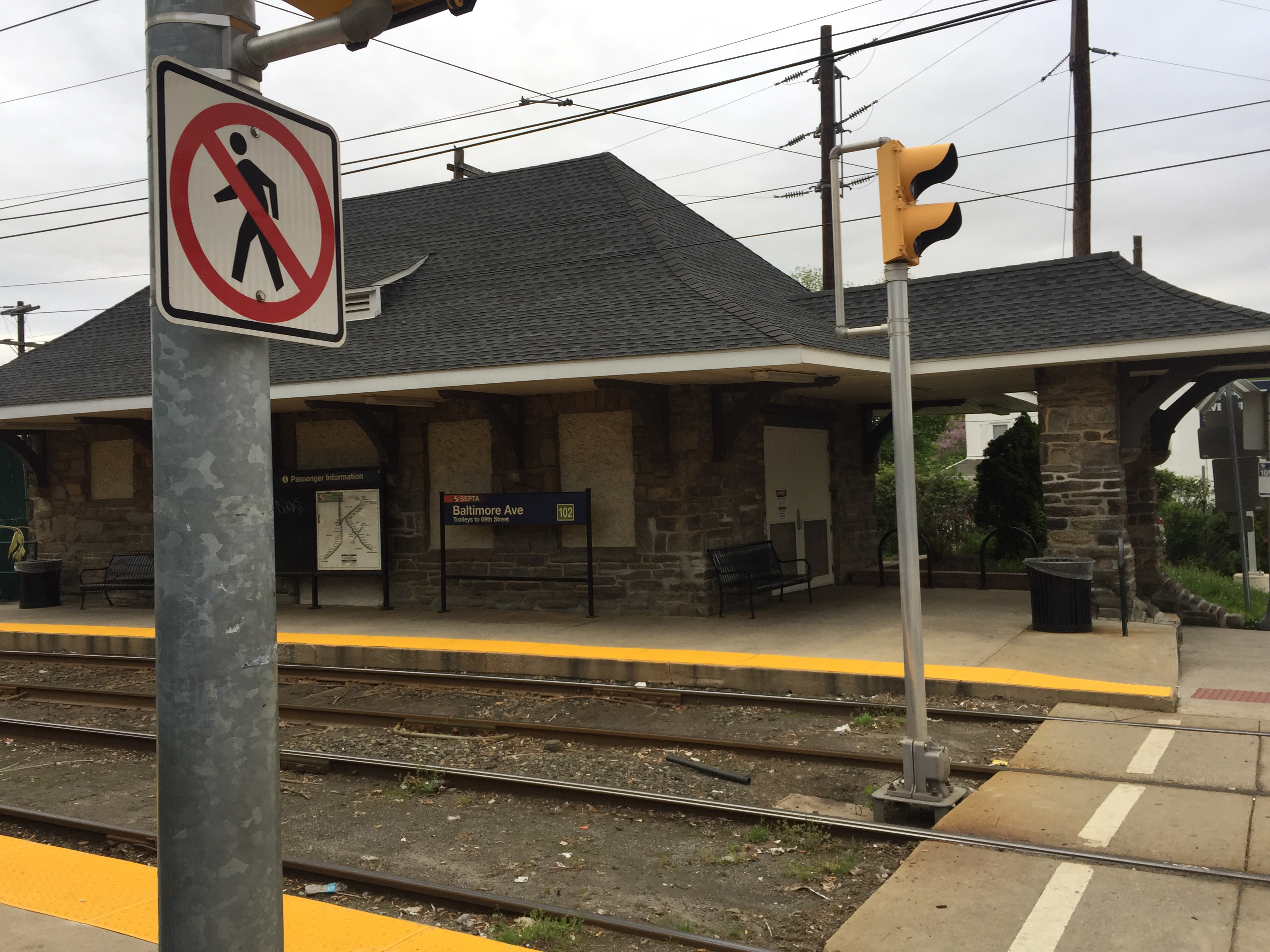 Baltimore Pike station